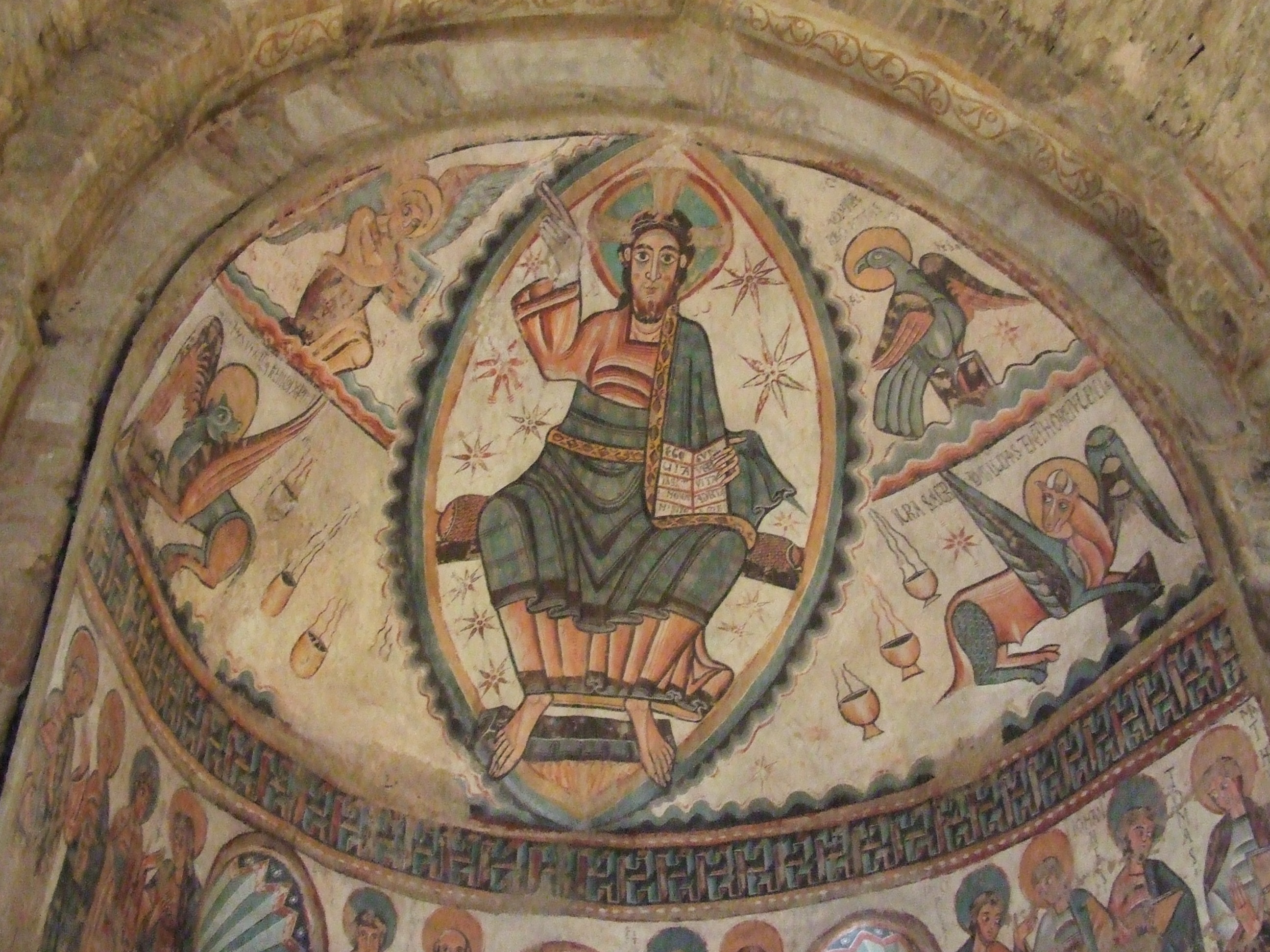 Detall de les pintures de l'absis central (Santa Maria de Mur, Castell de Mur, Pallars Jussà)